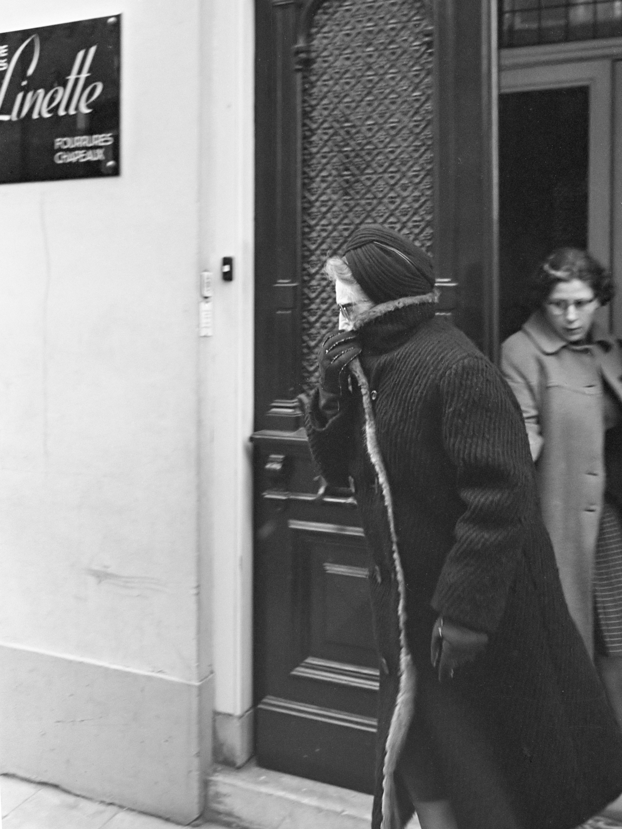 Geheimzinnigheid rondom modehuis Linette te Den Bosch , mevrouw Berge Farmick met zonnebril en kraag op verlaat atelier 20 januari 1966